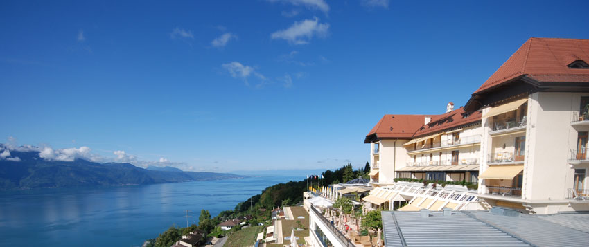 Vue extérieure du bâtiment historique du Mirador Kempinski